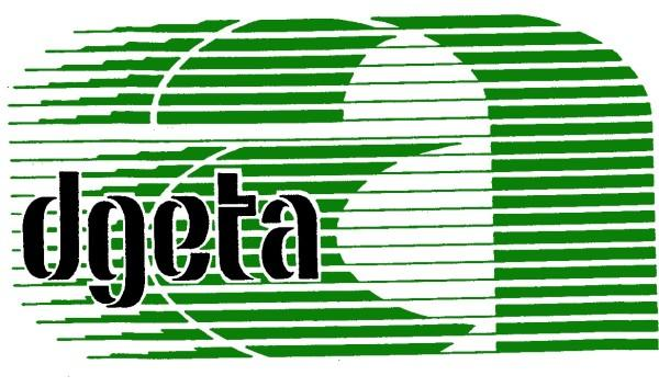 Direccion General de Educacion Tecnologica Agropecuaria